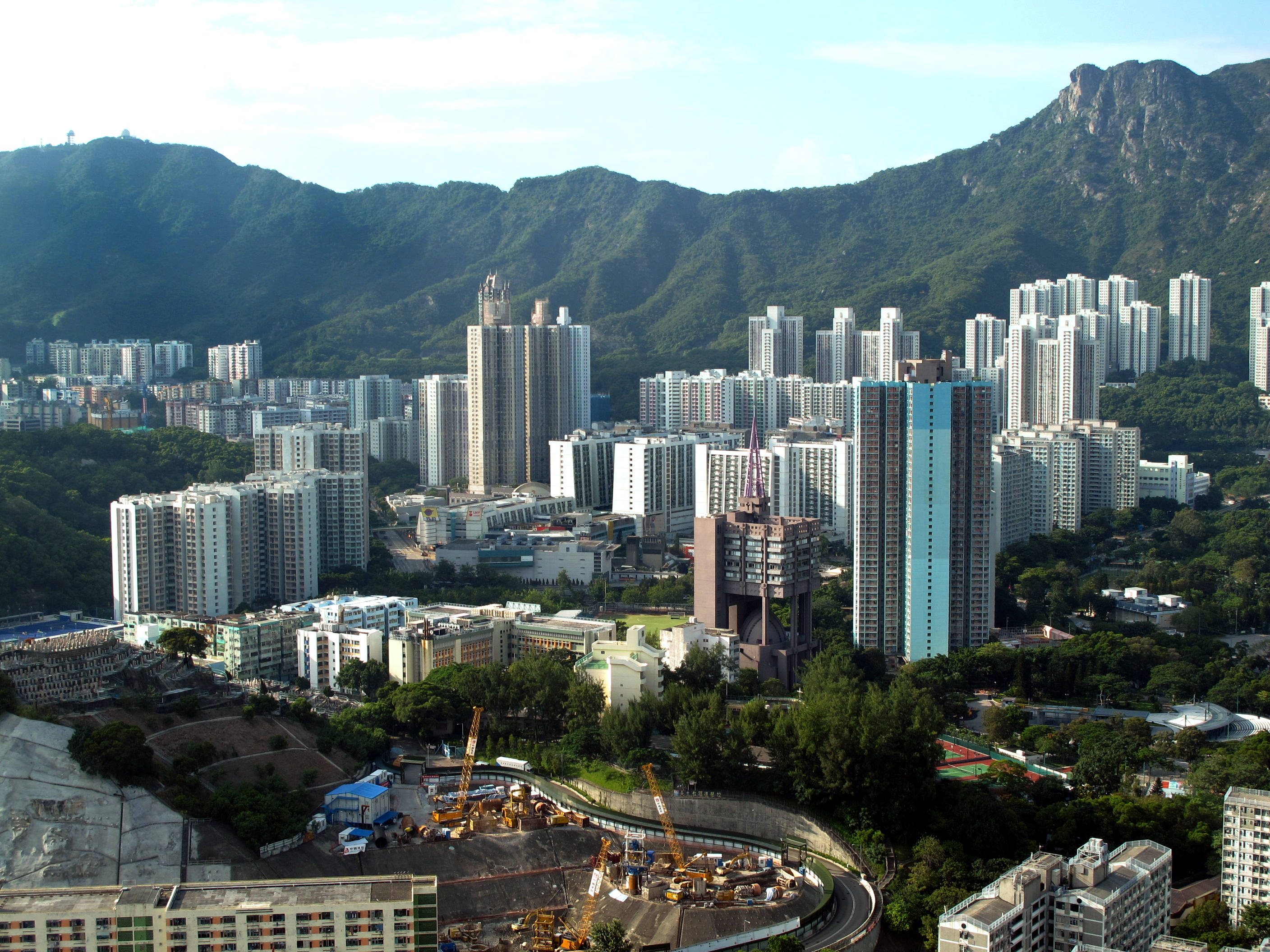 Lok Fu 樂富